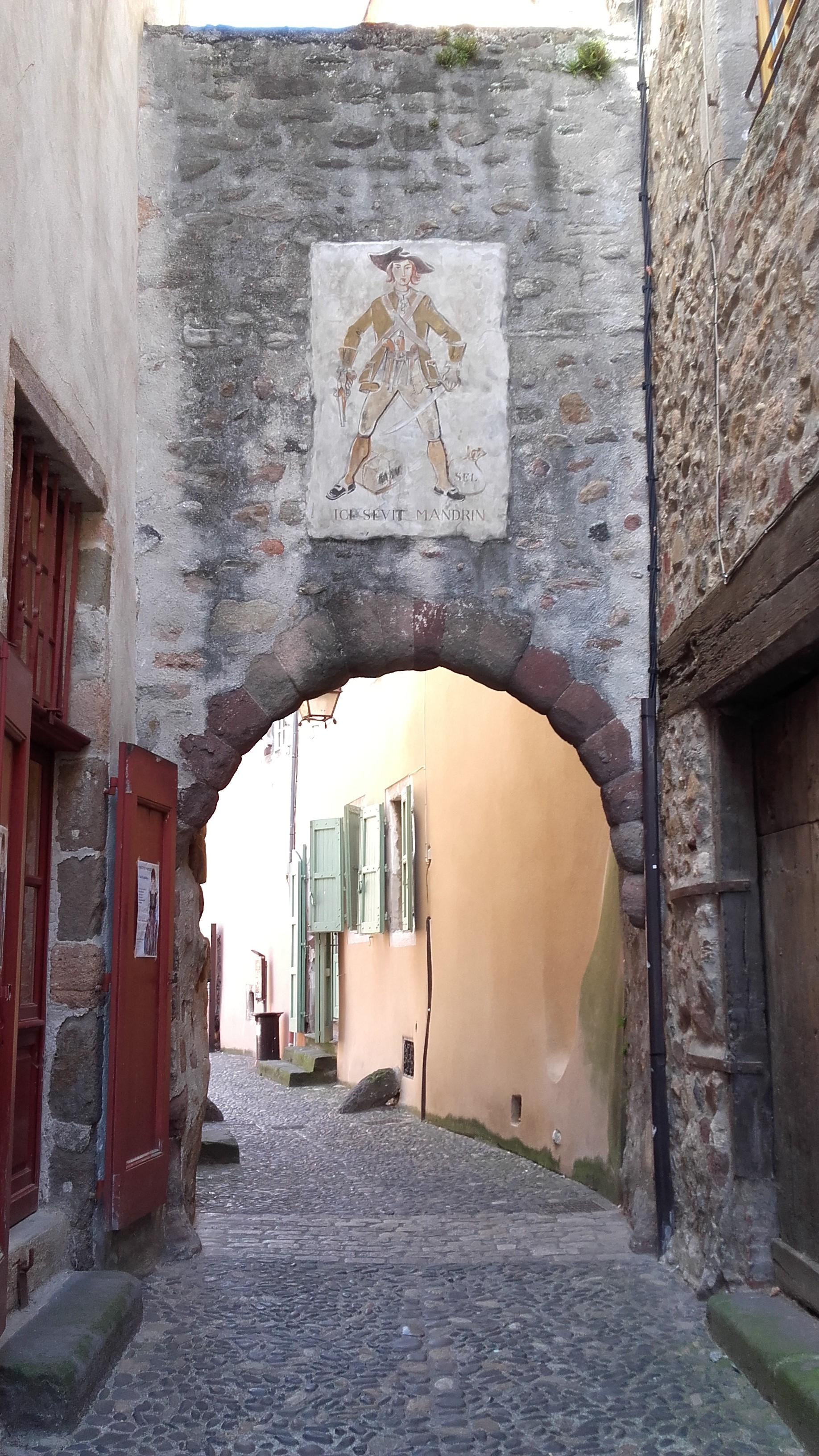 "Ici sévit Mandrin" : Portrait de Mandrin à Brioude, dans le passage Mandrin